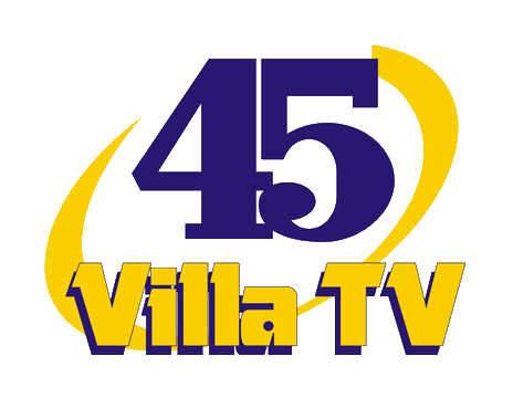 Logo que figuraba desde el 1992 hasta el año 2013 del canal que fue VillaTV, en el canal 45 del sur de Lima.